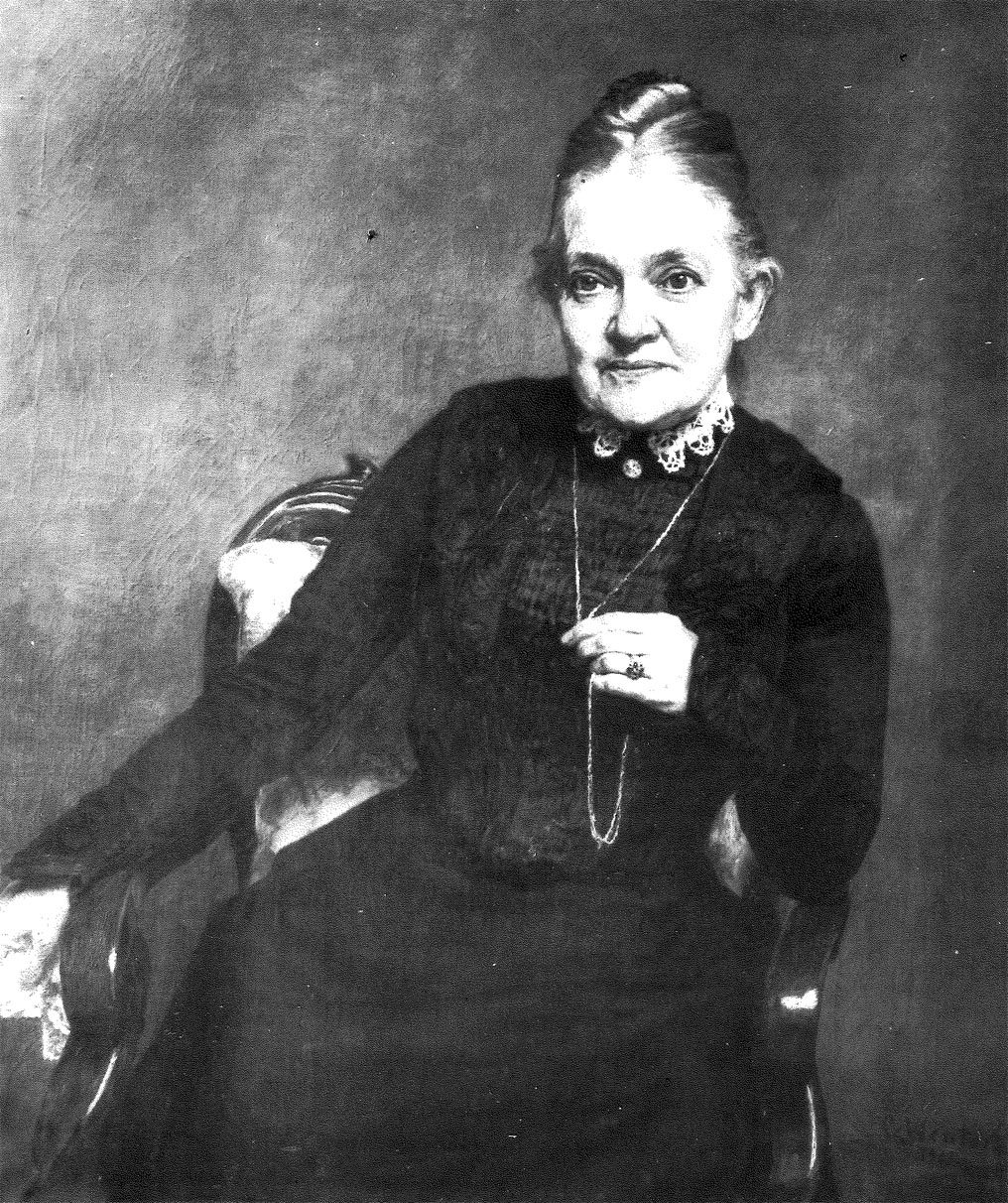 Portræt af institutbestyrinde Marie Kruse. Af Carl Wentorf (1902).